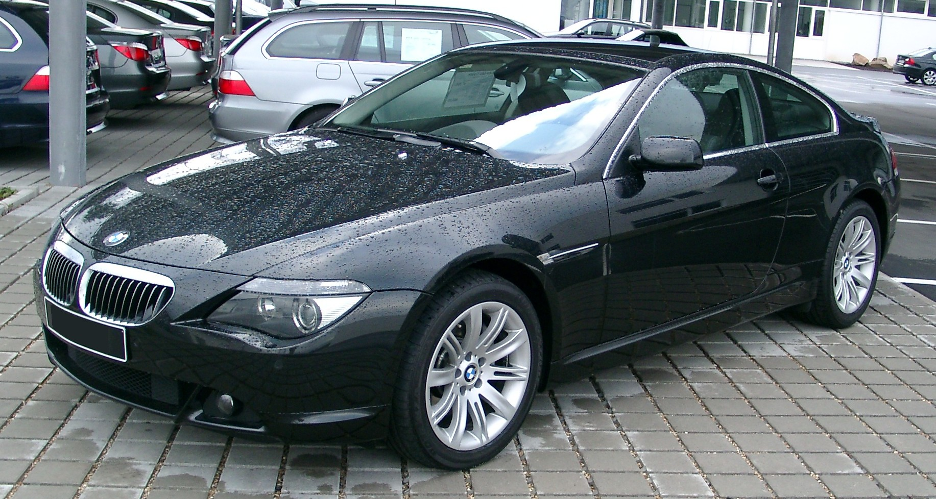 BMW E63